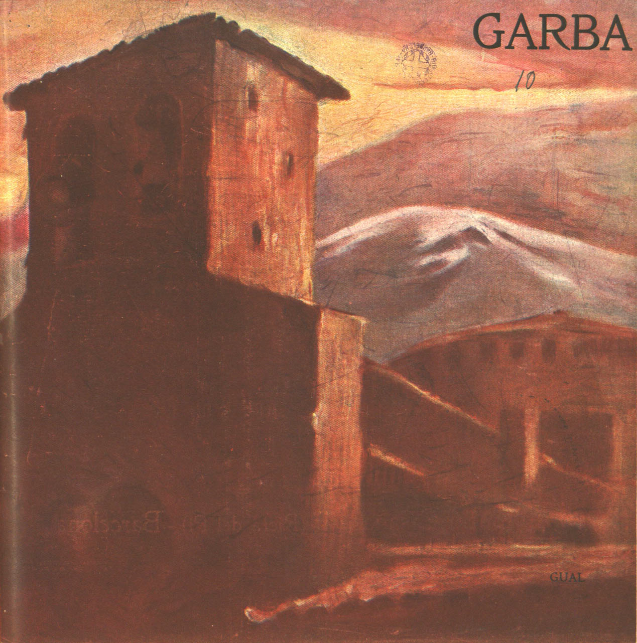 Garba (revista)